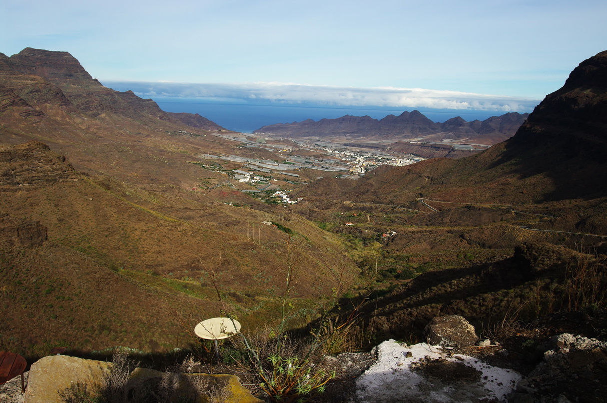 San Nicolas, Gran Canaria